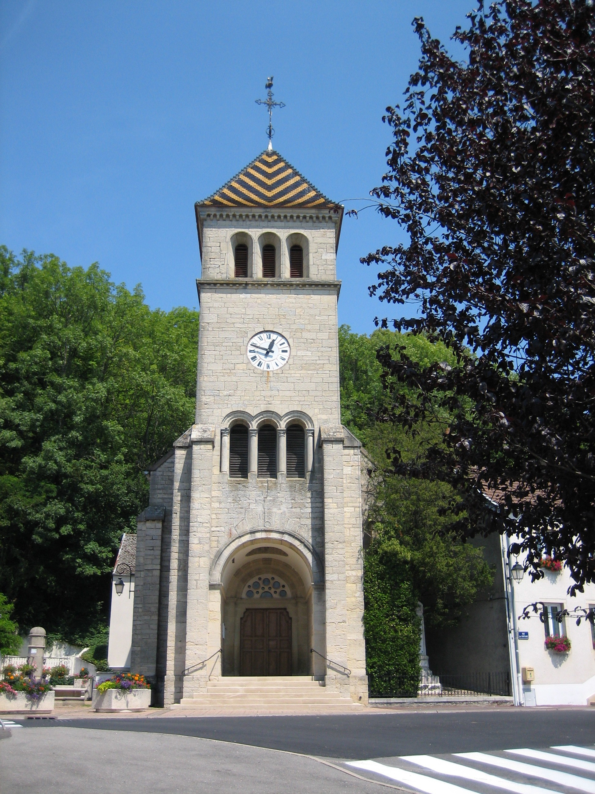 Eglise Saint-Laurent de Daix